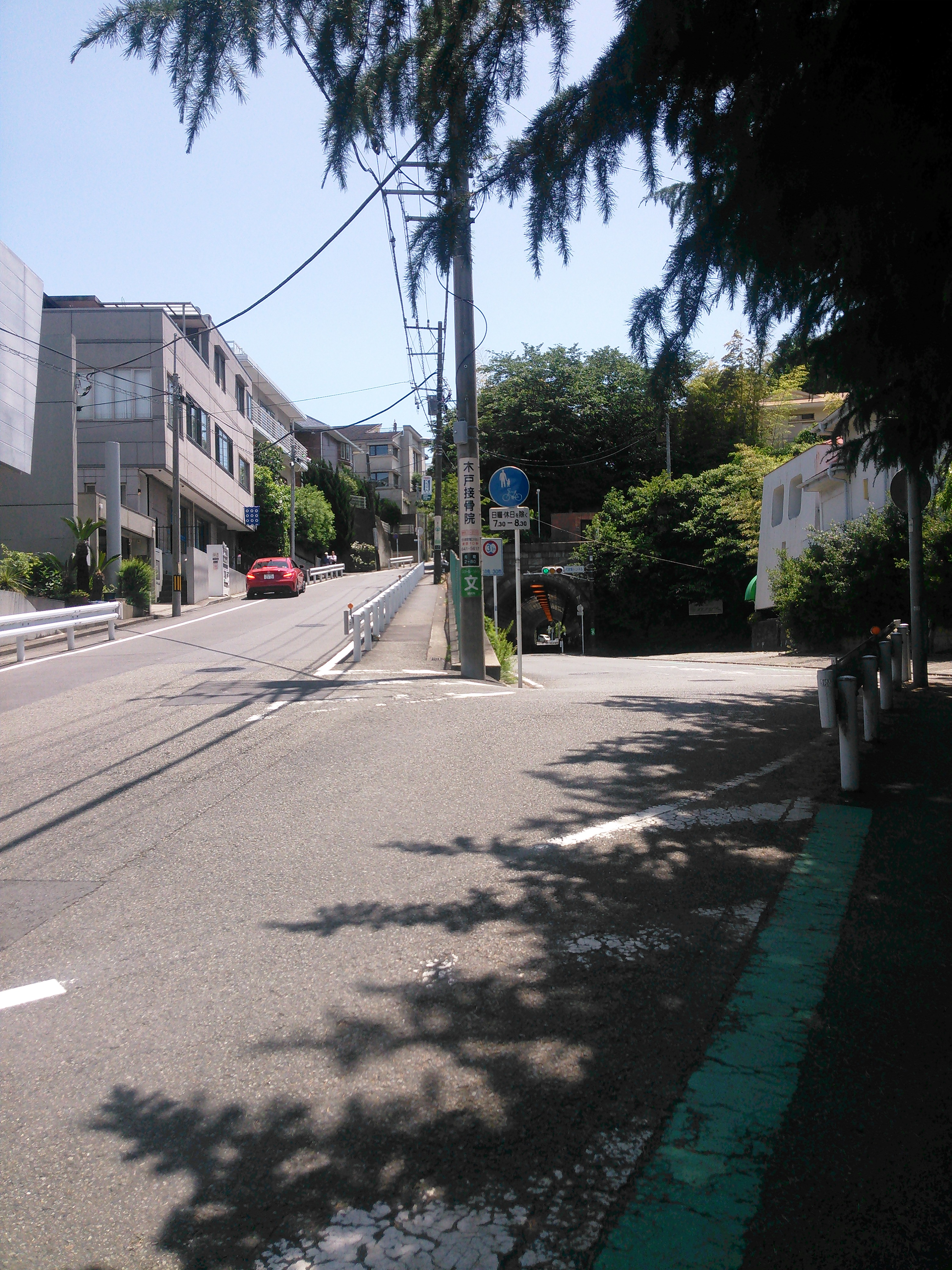 横浜市中区、代官坂。右手は代官坂トンネル。